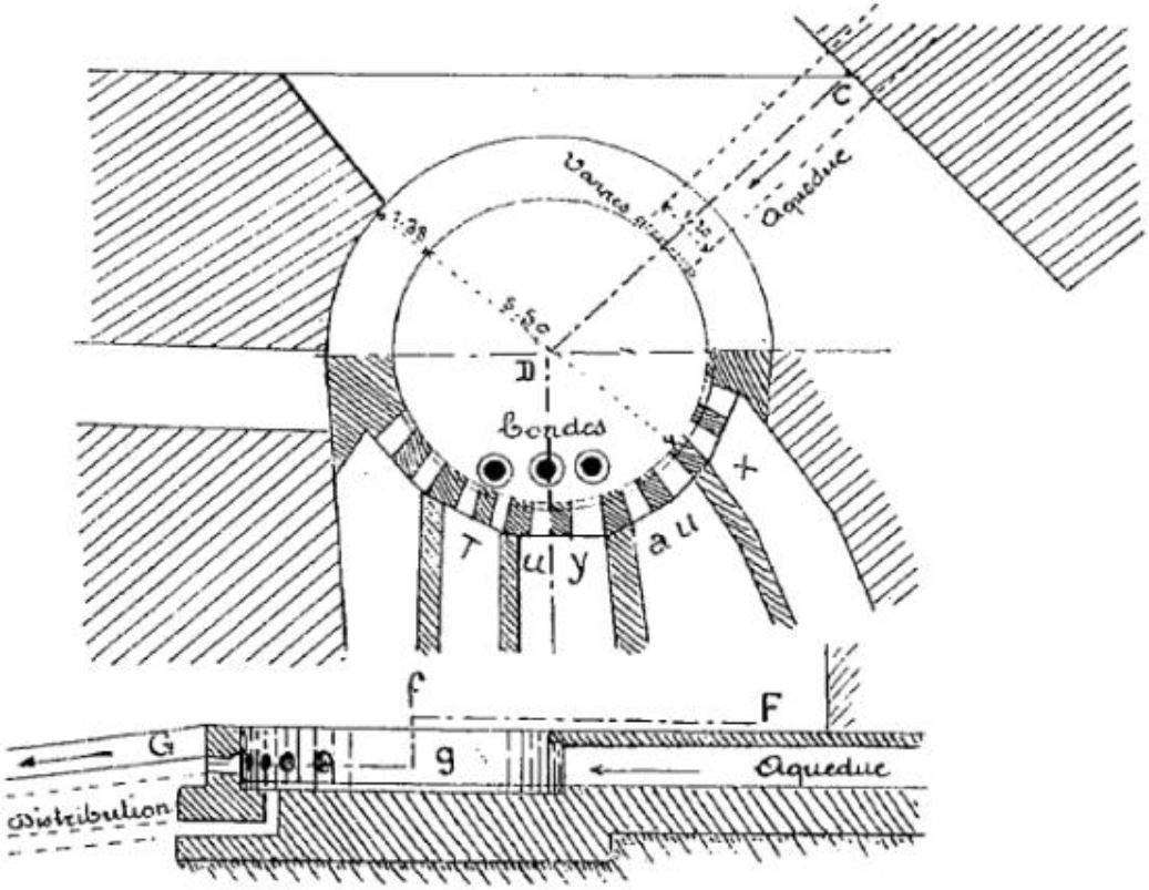 Dessin représentant en coupe et en plan la chambre de distribution d'un château d'eau de l'aqueduc romain de Nîmes